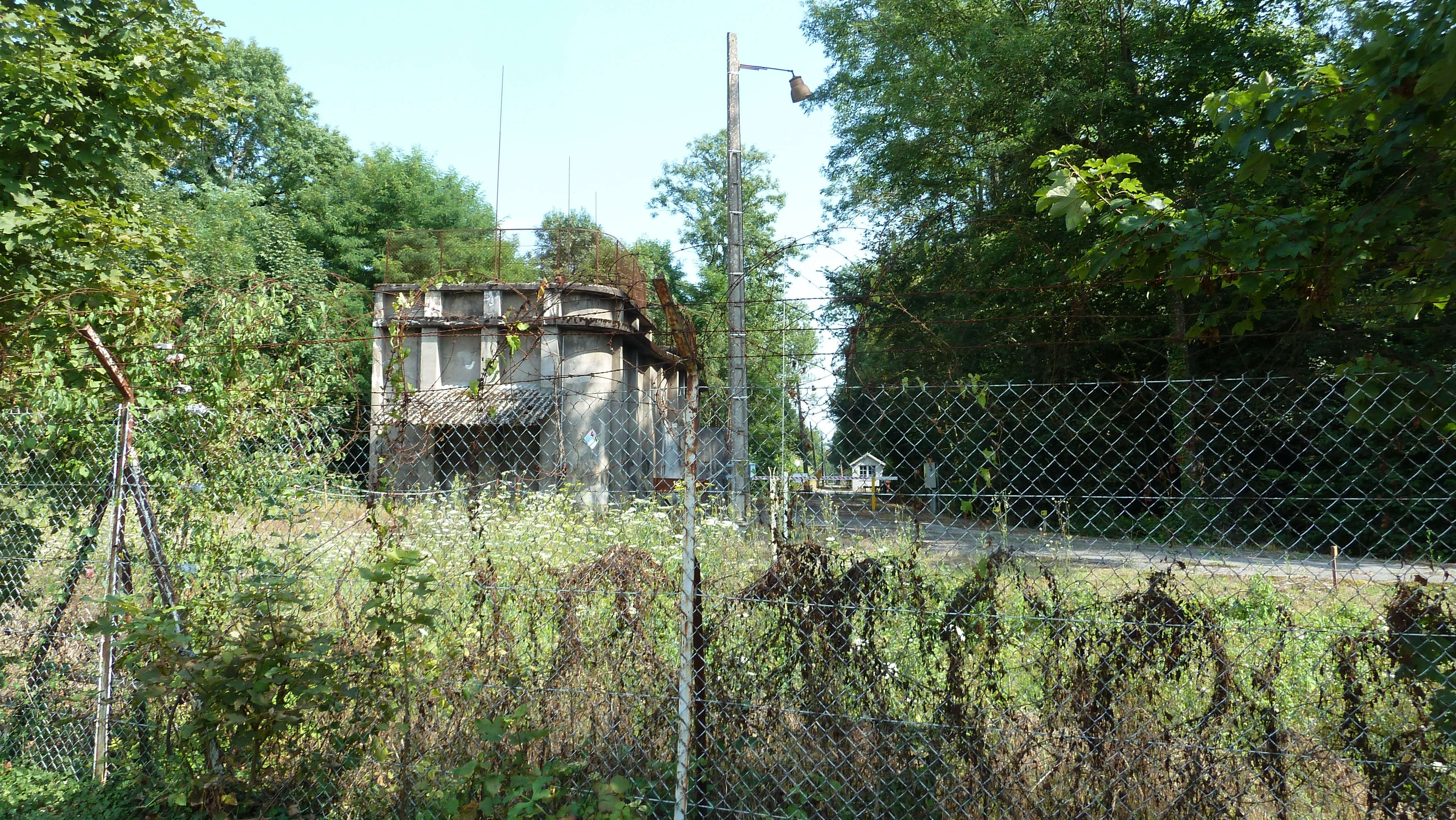 La poudrerie de Vonges vue depuis les installations sportives.